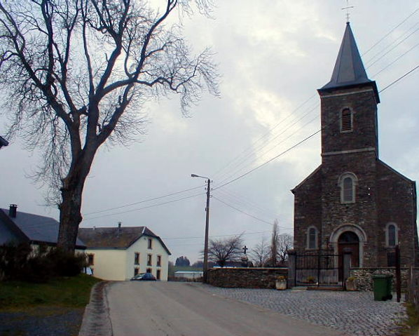 Walon: eglijhe di Mont-dlé-Oufalijhe